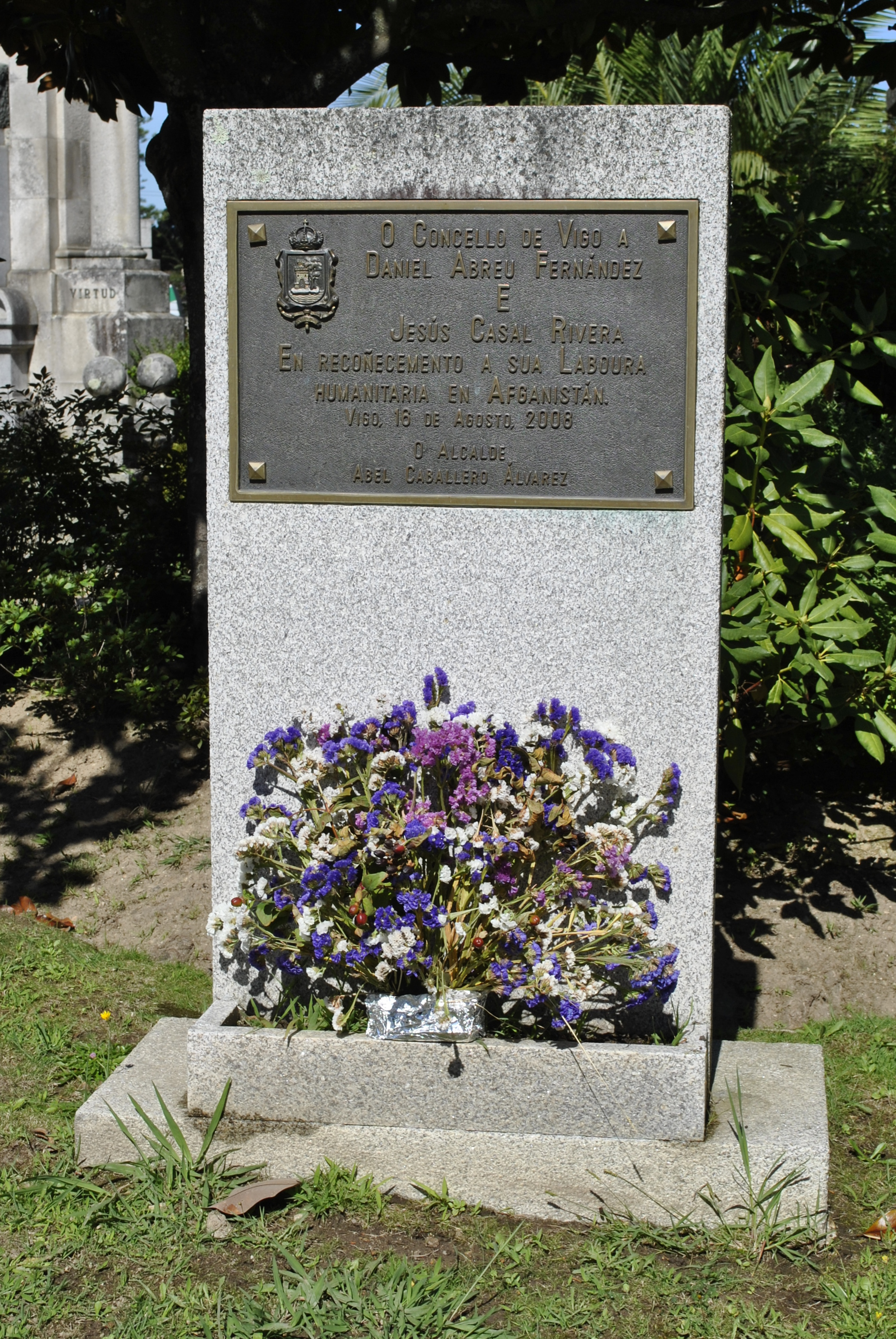 O Concello de Vigo a Daniel Abreu e Jesús Casal.jpg